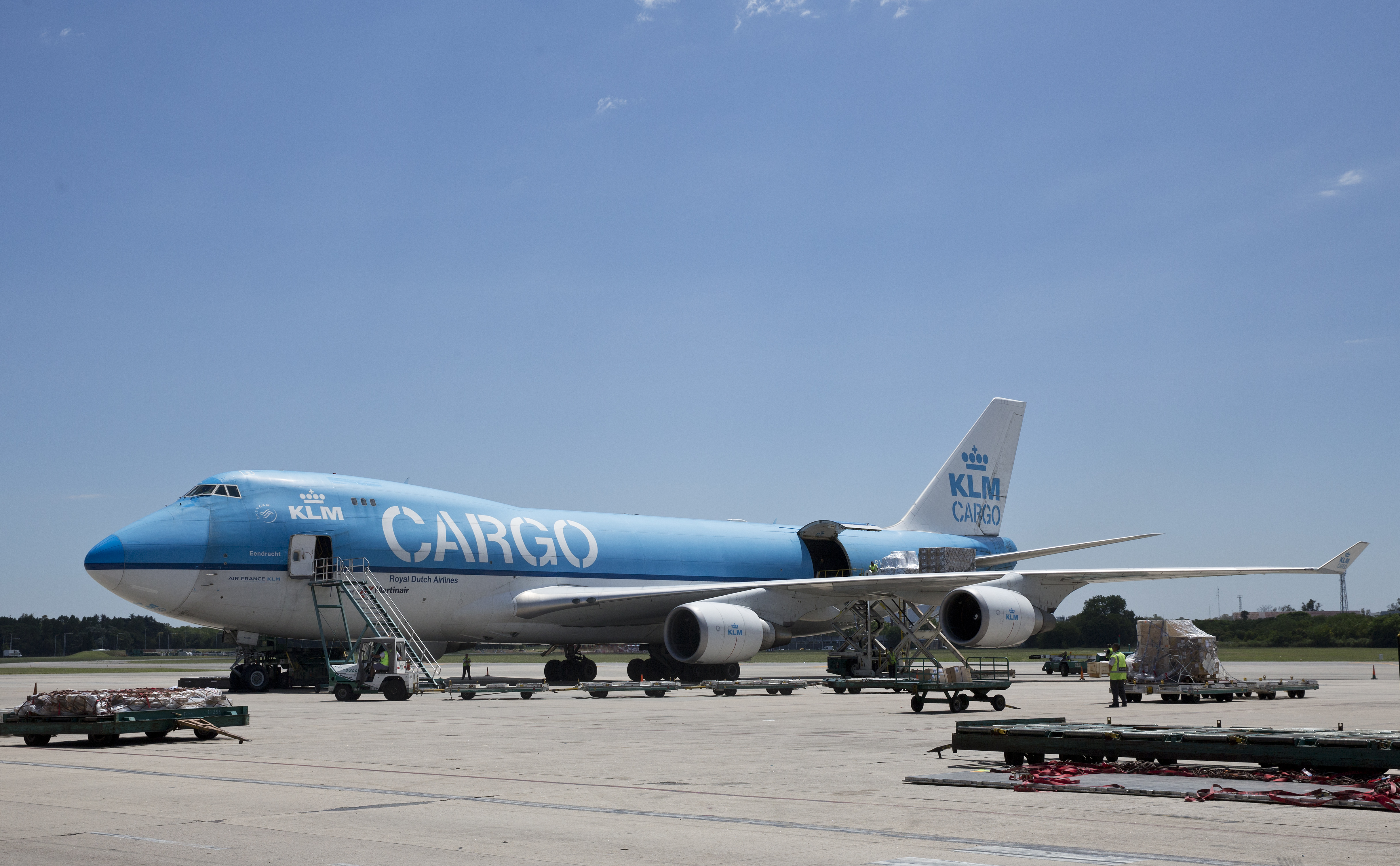 Buenos Aires, 15 de Enero de 2016 Tras una investigación judicial que demandó 15 años, la Argentina, a través del Ministerio de Cultura de la Nación, efectivizó hoy la devolución de 439 piezas arqueológicas completas a Ecuador, entre las que hay vasijas silbadoras, esculturas eróticas, apoyanucas, pipas, cinceles, botellones, adornos, y artesanías de cerámica, oro y hueso. Las piezas partieron esta mañana del Aeropuerto Internacional de Ezeiza, en un avión de cargo, custodiados por la PSA, con destino a Ecuador. Fotos: Silvina Frydlewsky / Ministerio de Cultura de la Nación